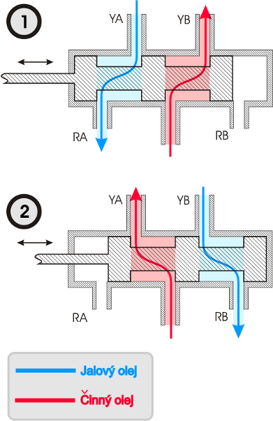 Hydraulik - cinnost y-ventilu